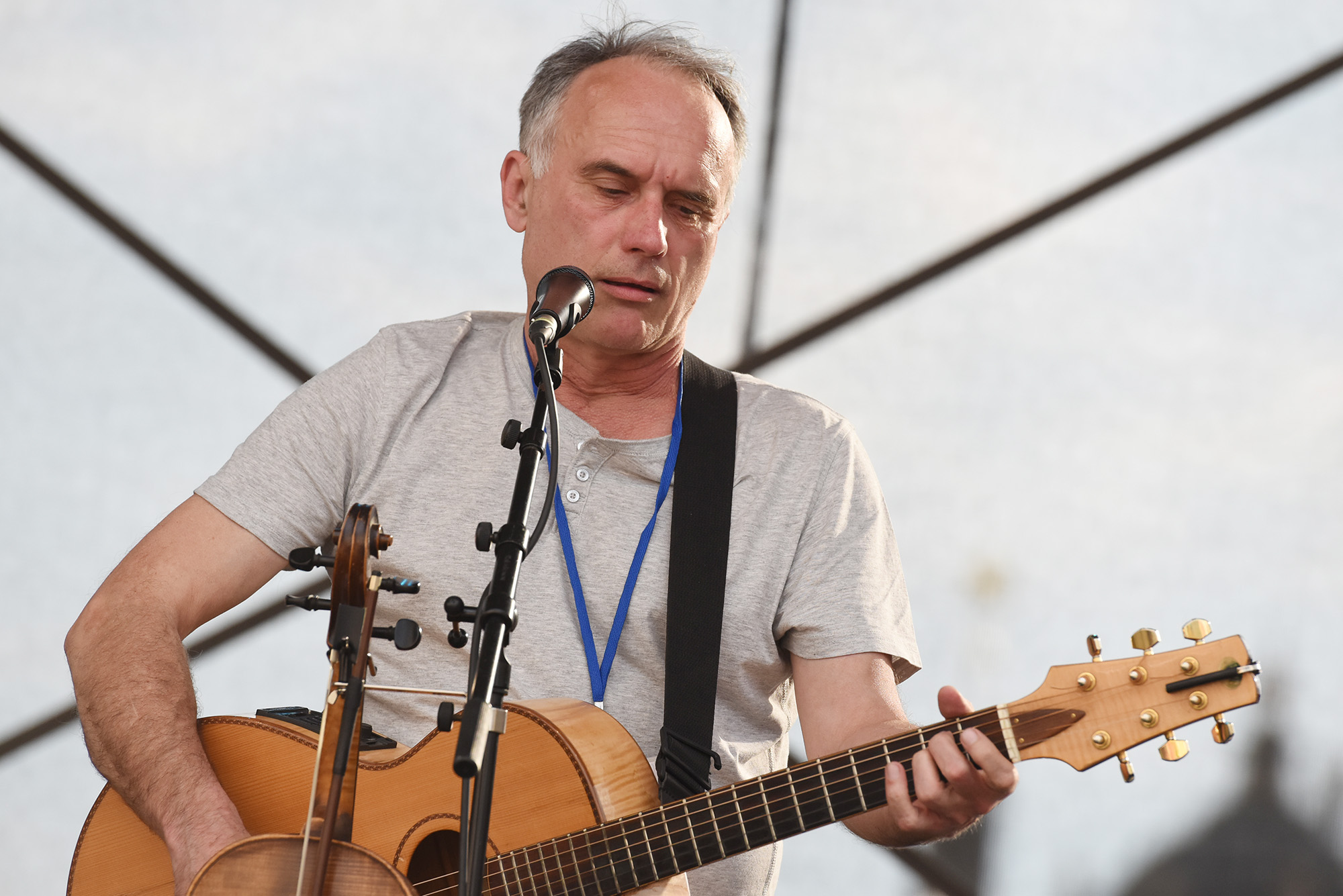 Neřež. 2017